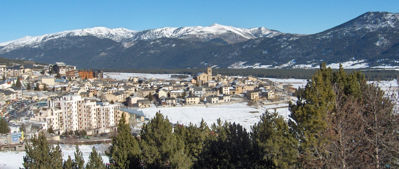 Vista dels Angles des de l'estació d'esquí vers el nord-est (Capcir, Catalunya Nord). Fotografia pròpia Vue des Angles depuis la station de ski direction nord-est (Capcir, Catalogne Nord). Els Angles as seen from the ski resort looking north-east (Capcir, North Catalonia). Own work